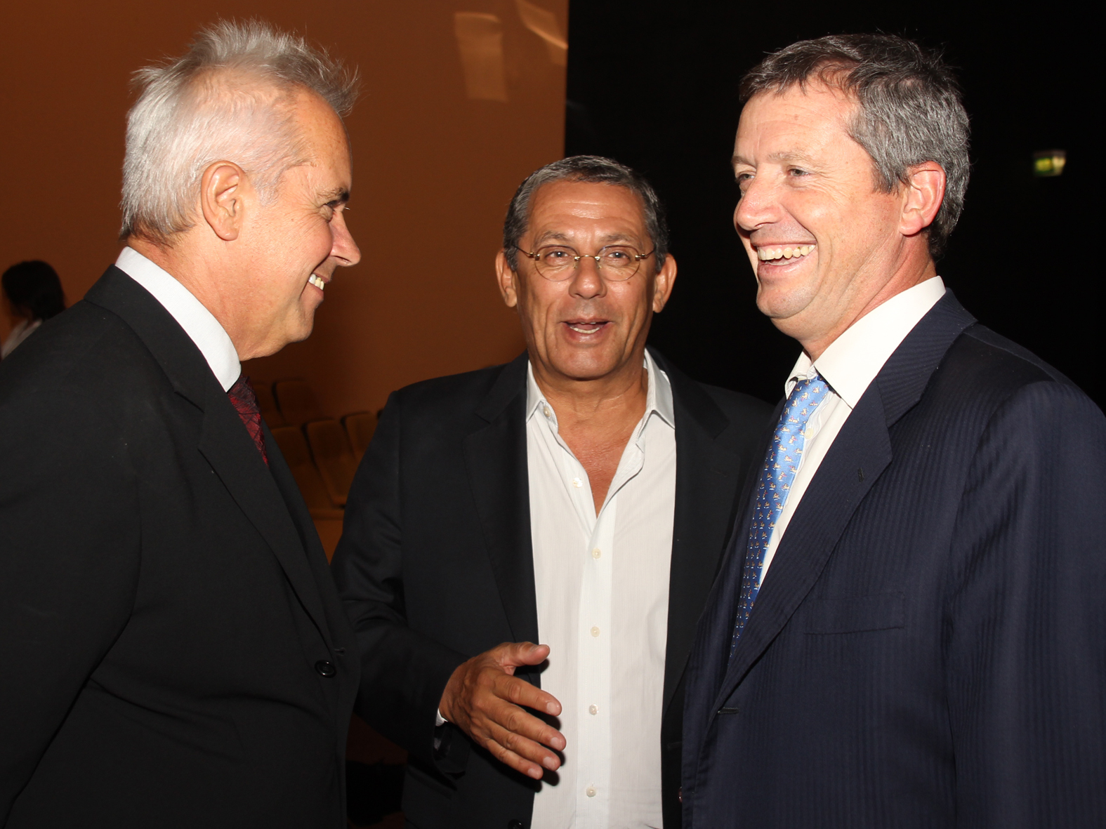 Neuquén, 15 de marzo de 2012 - El ministro de Gobierno de la ciudad de Buenos Aires, Emilio Monzó, asistió en Neuquén a la primera transmisión en vivo de una función del Teatro Colón y compartió la gala con el intendente local, Horacio "Pechi" Quiroga, y con Oscar Smoljan, director del Museo de Bellas Artes de la ciudad, en cuya sala fueron reproducidas las escenas de la ópera "La Pasión según San Marcos" con imagen de alta definición.